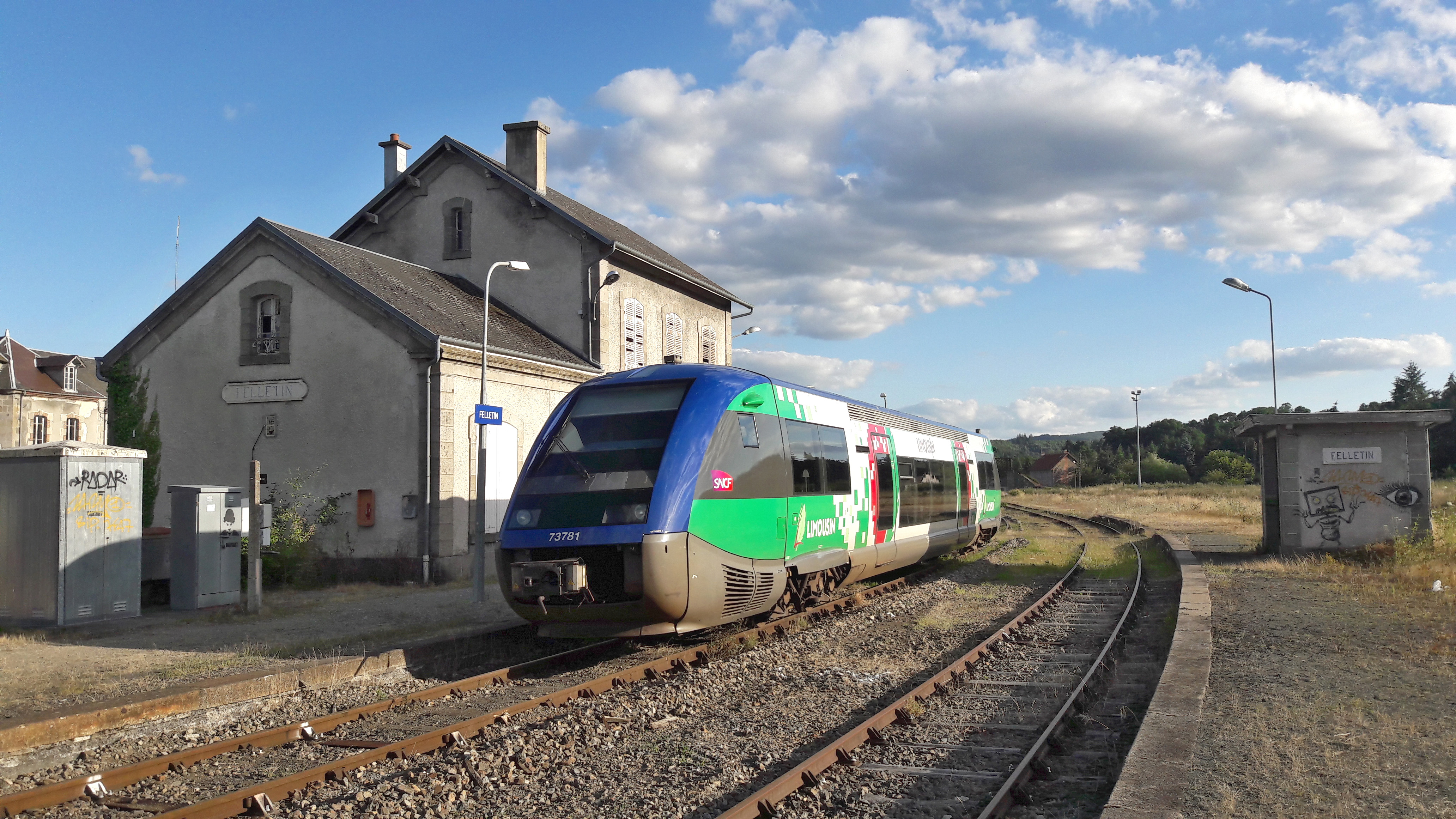 Vu de la deuxième voie à quai pour d'autre train pour dépannage, voie toujours entretenu